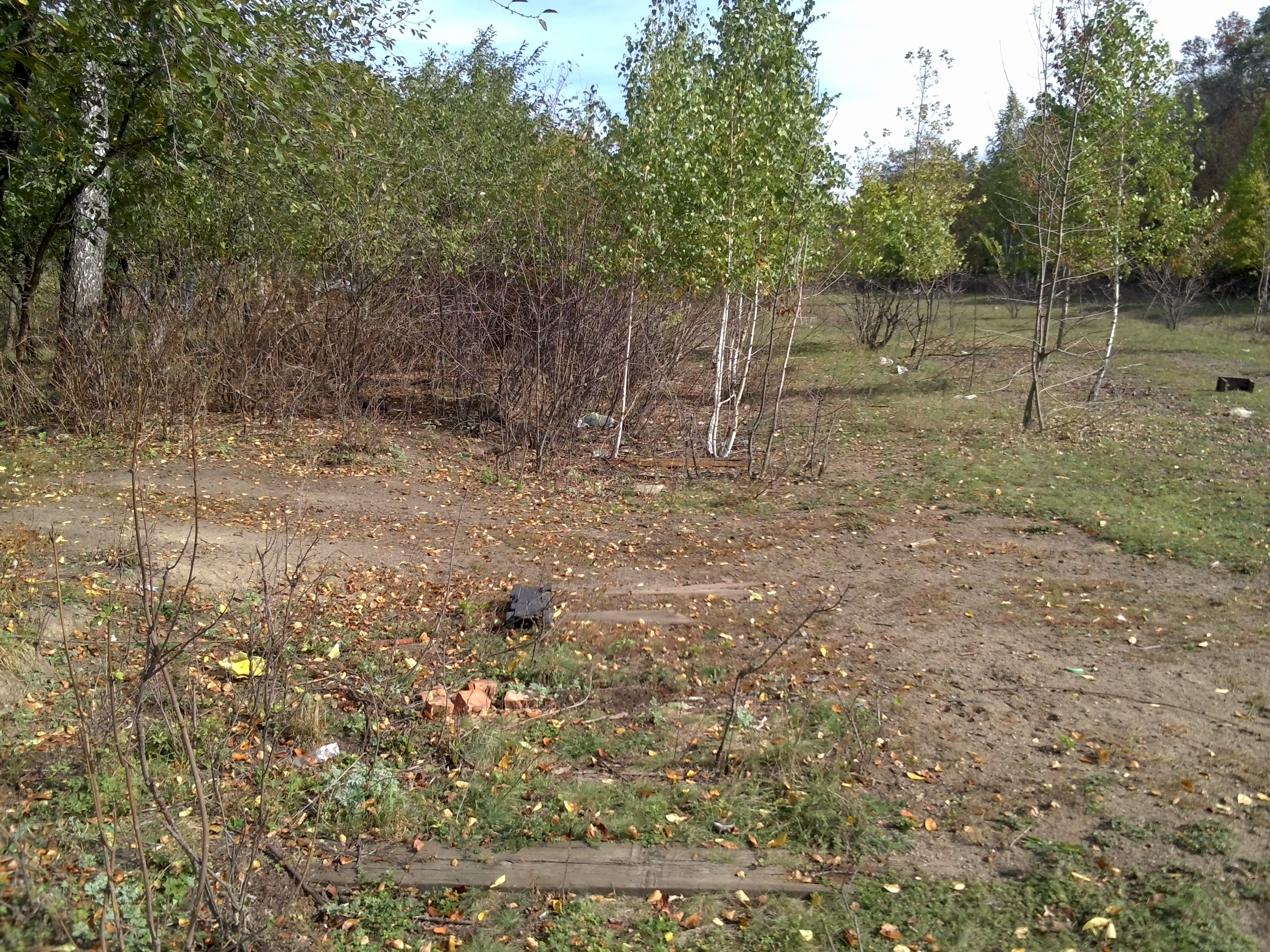 ст. Нова Гребля